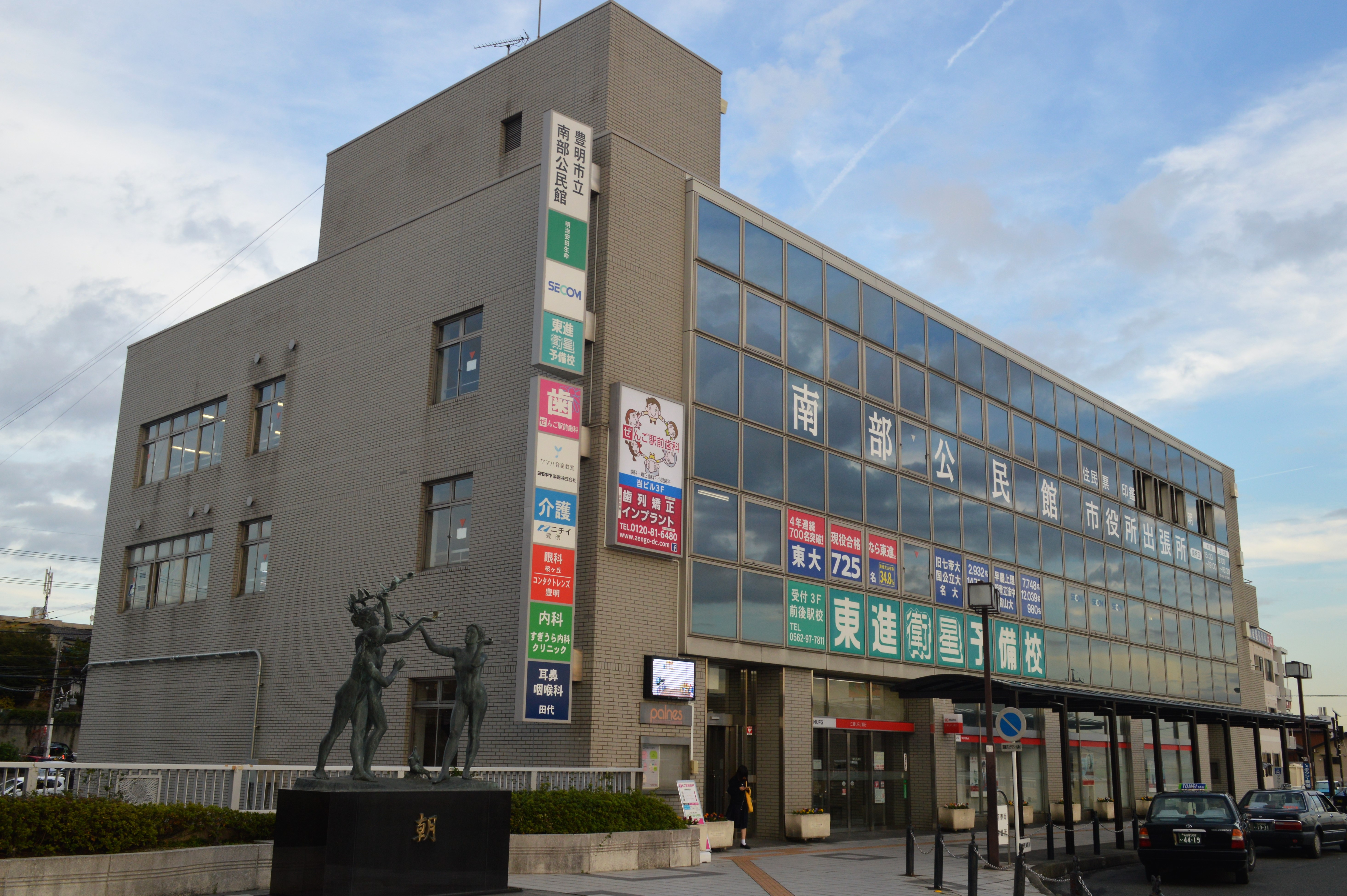 愛知県豊明市の複合施設「パルネス2号館」。